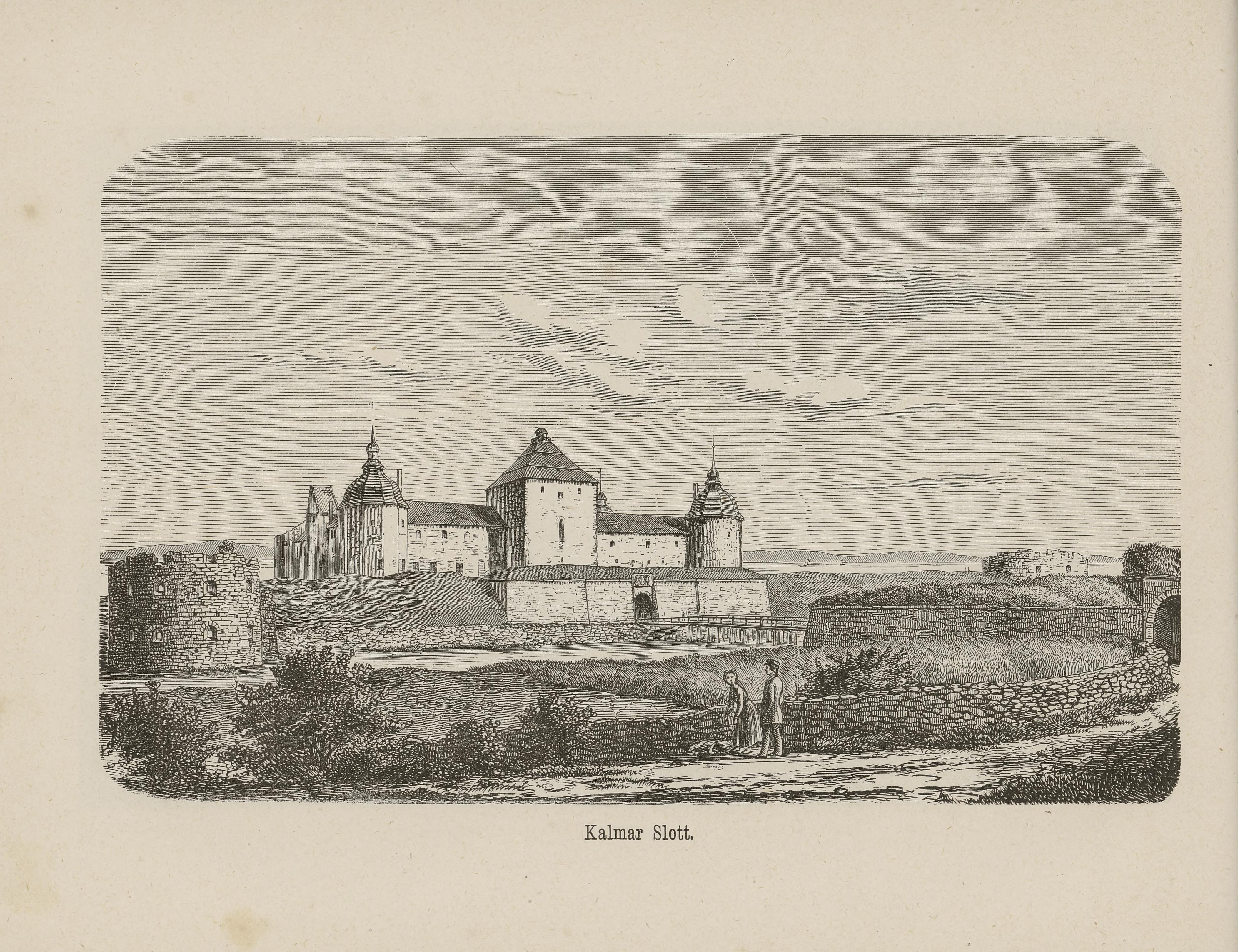 Illustrasjon hentet fra boken Nordiska taflor av ukjent forfatter og utgitt av Albert Bonnier (se, 1865)